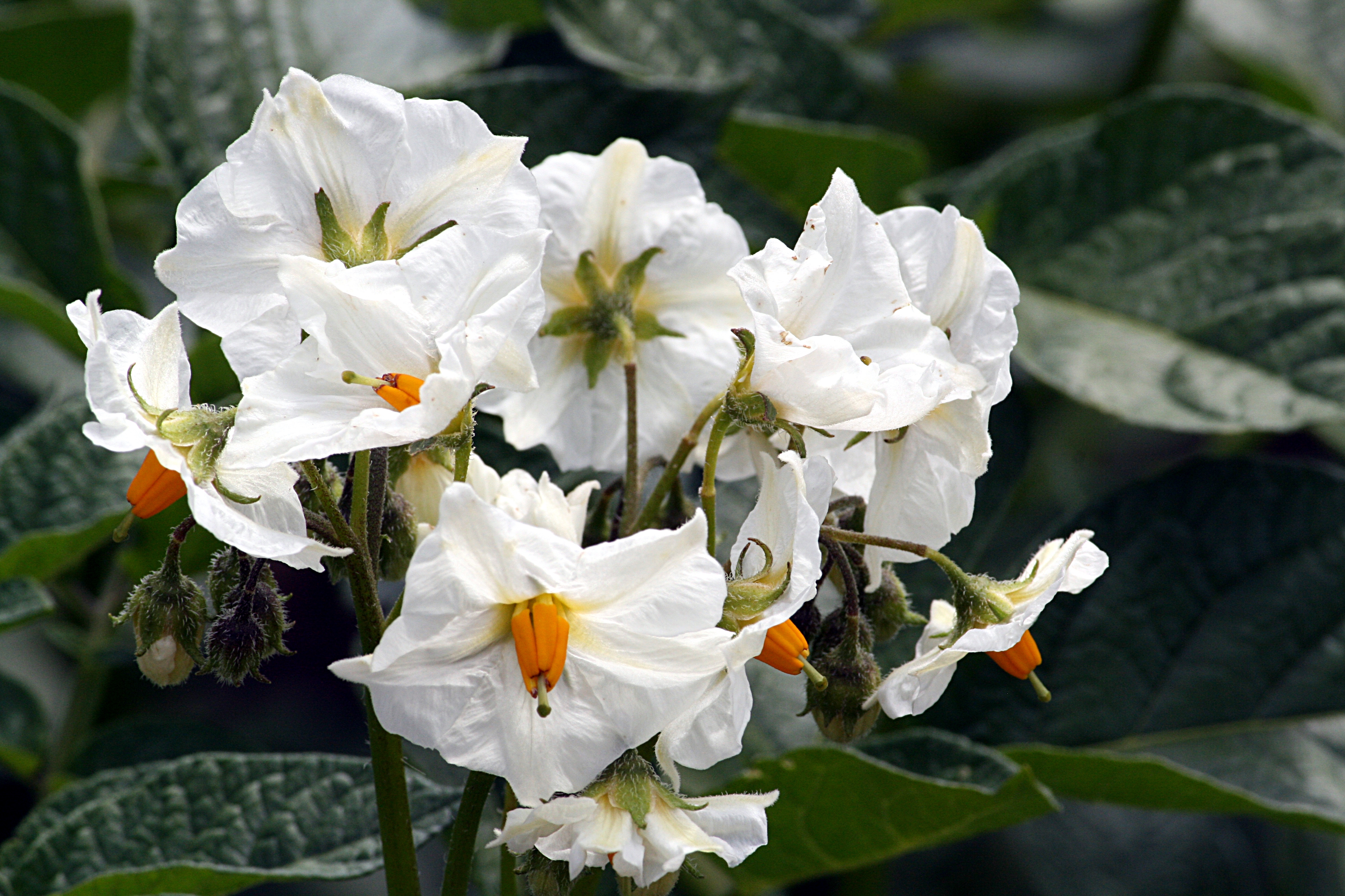 Kartoffelblüte